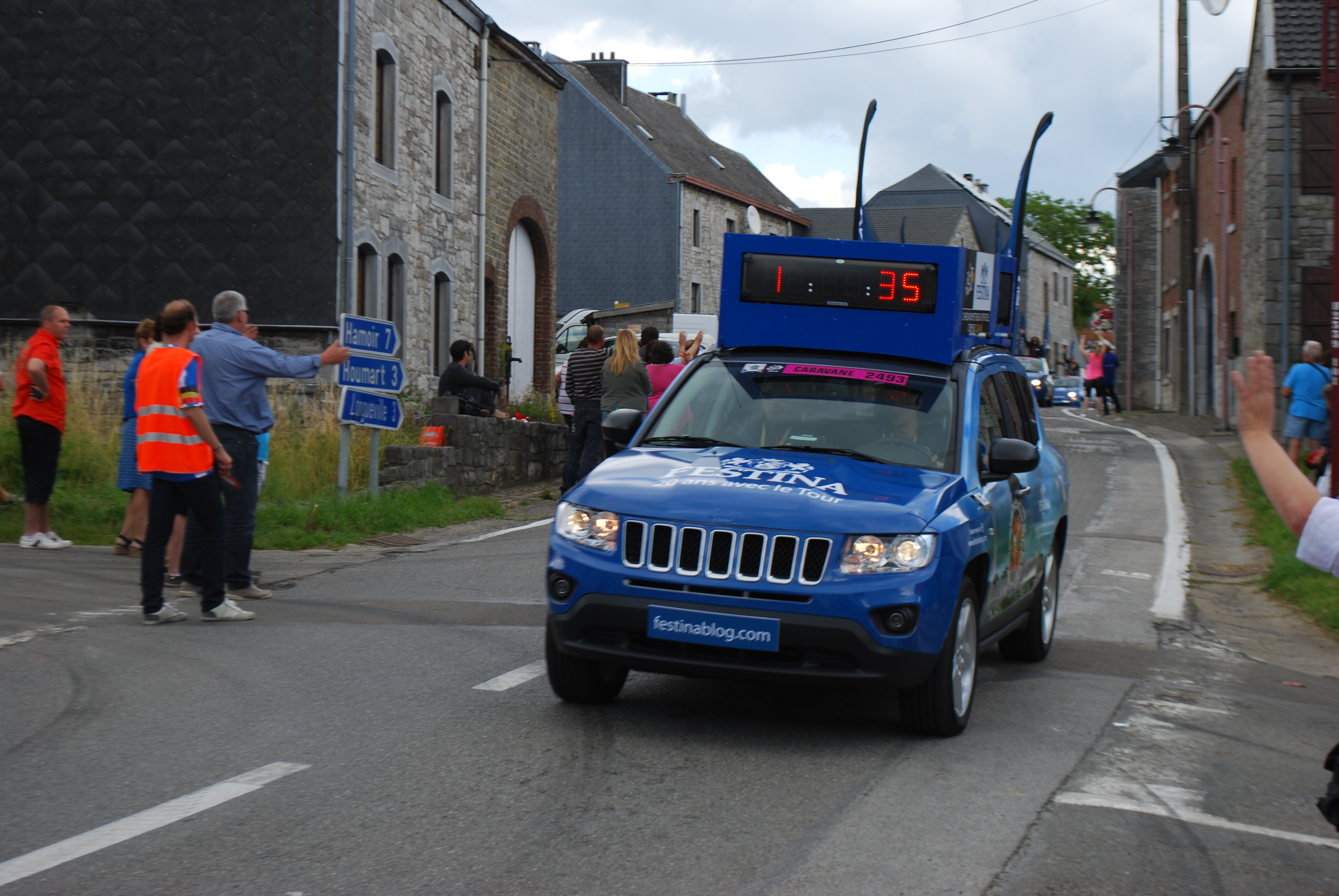 Vue du passage du Tour de France à Tohogne (Durbuy).